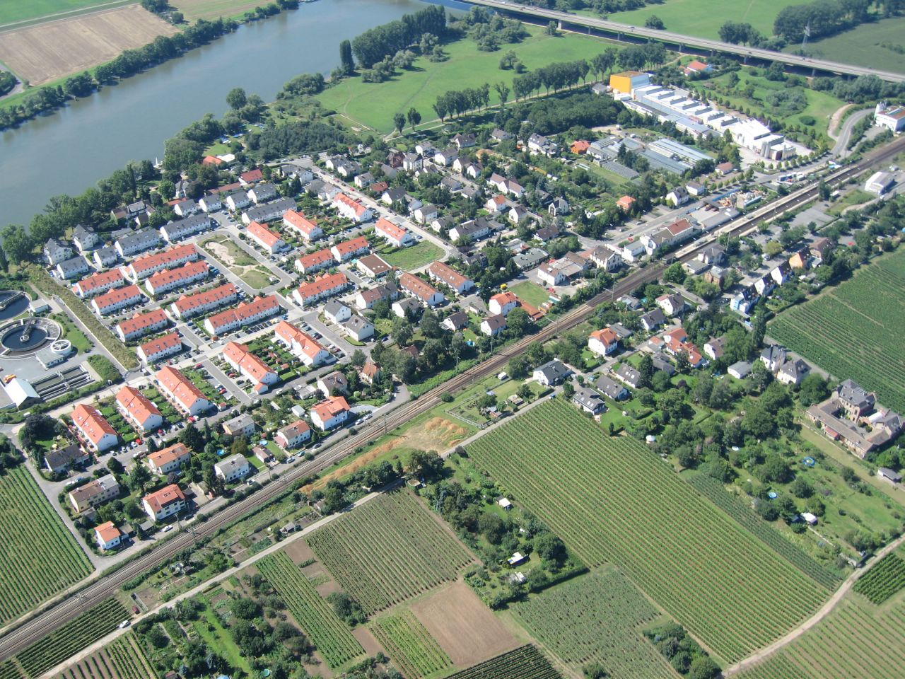 Hochheimer Südstadt mit Kläranlage aufgenommen vom Gleitschirm aus am 13.Aug.2005.